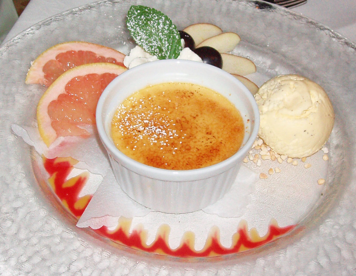 Creme brulee